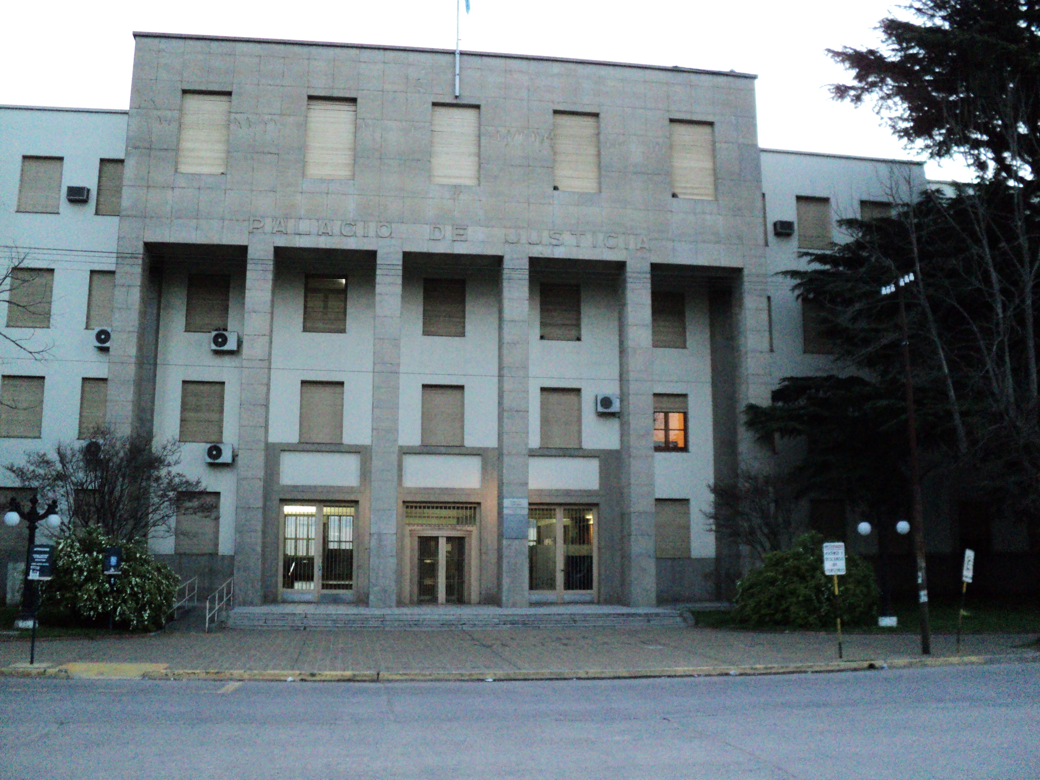 la delacion de justicoa provincial con cede ne la ciuad de azul